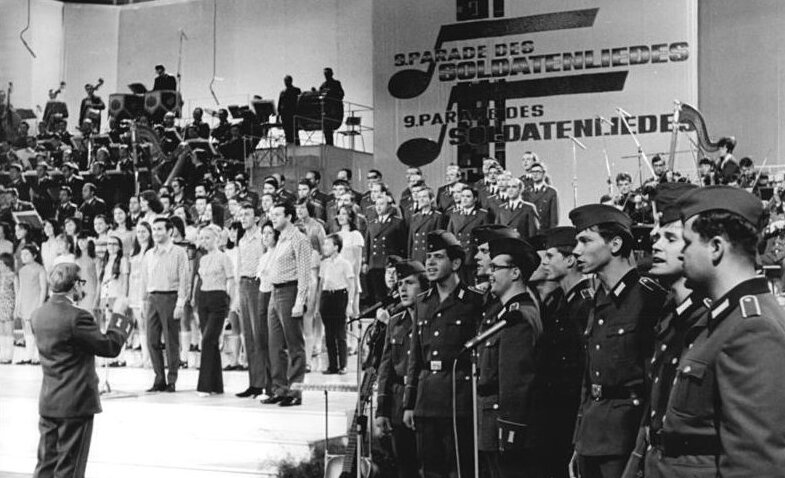 ADN-ZB Reiche 17.6.72 Schwerin: 14. Arbeiterfestspiele- Öffentlich fand am 17.5.72 die Generalprobe zur 9. Parade des Soldatenliedes in der Rudolf-Harbig-Sporthalle statt. Es wird der traditionelle Beitrag der NVA mit bekannten und neuen Marschliedern, Songs und Soldatenschlagern. Gestaltet wird das Programm vom Erich-Weinert-Ensemble, vom Zentralen Orchester der NVA und von Singeklubs.